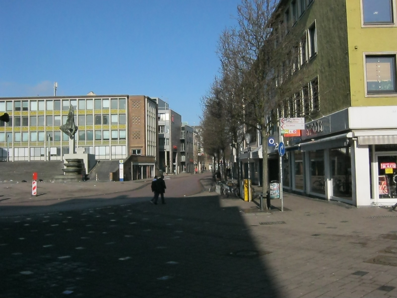 Die Zehnhofstraße in Düren, vom Markt aus gesehen